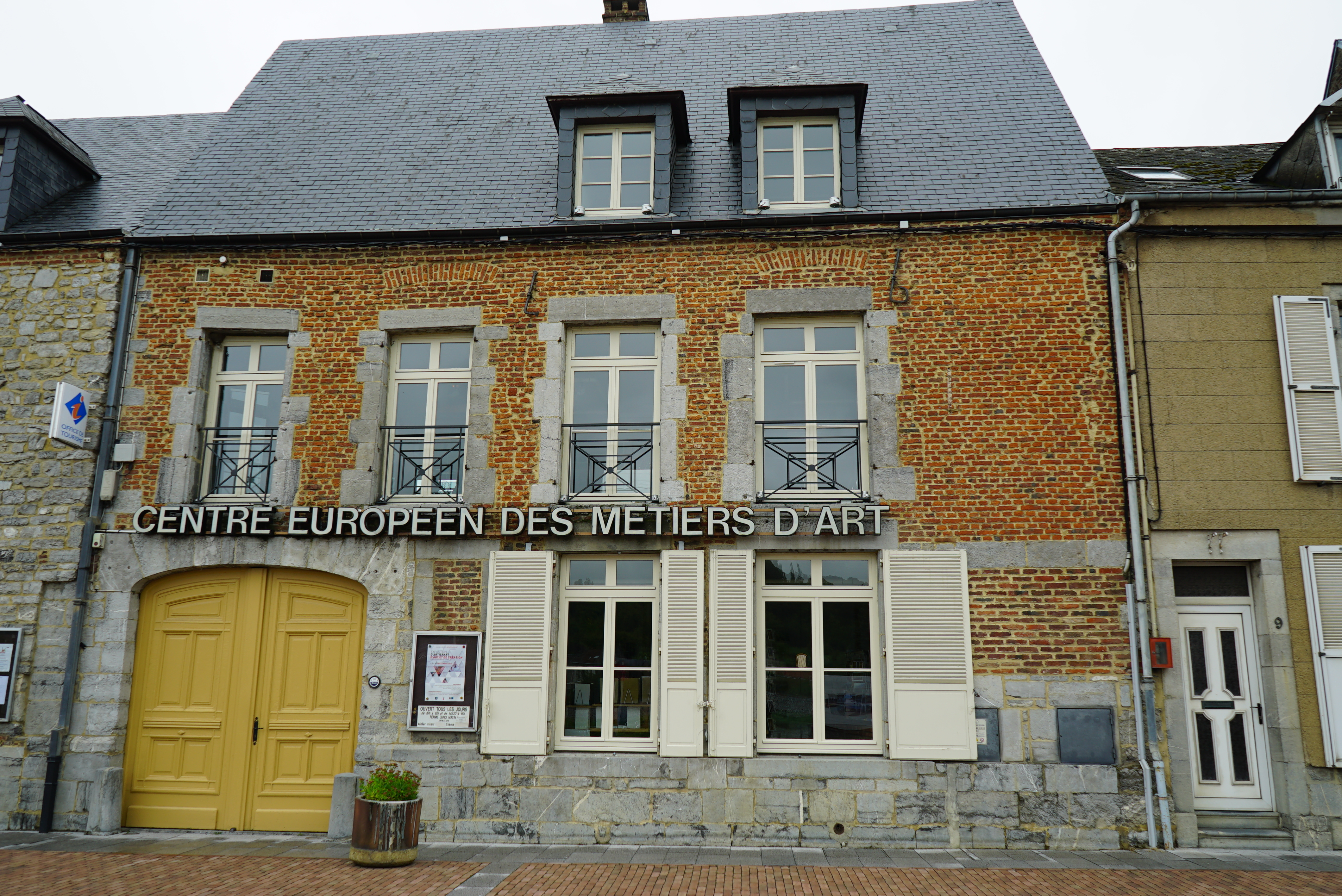 vue de Cf. titre.